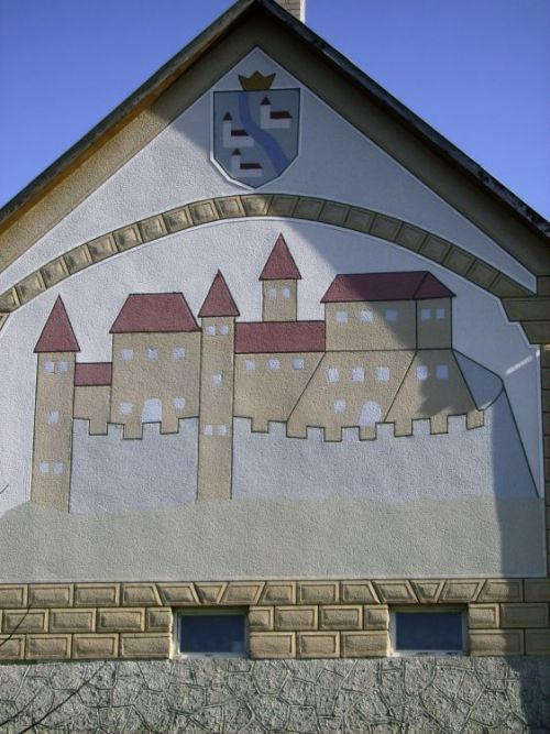 tekovsky hrad